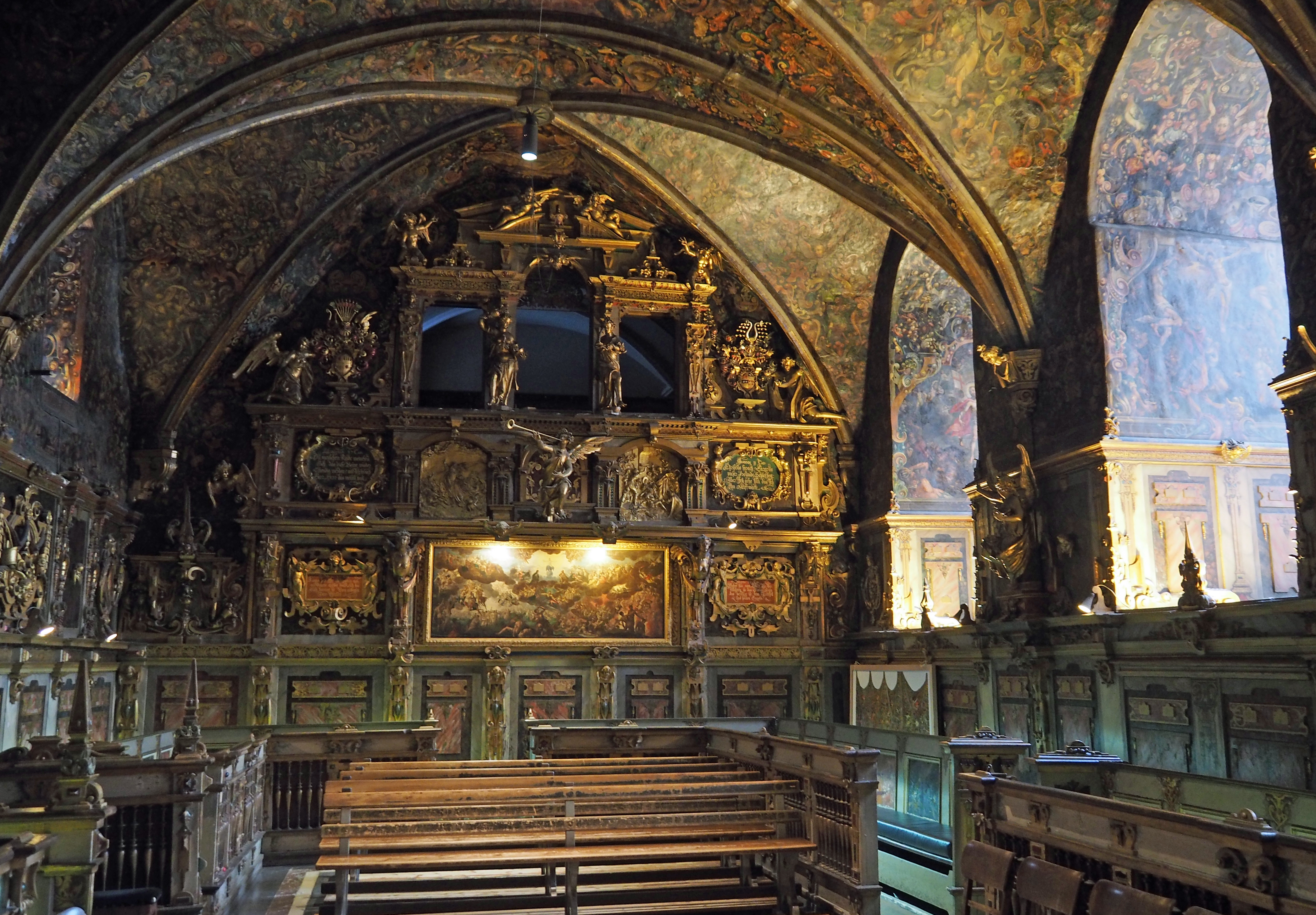 Innenraum der Schlosskapelle Bückeburg